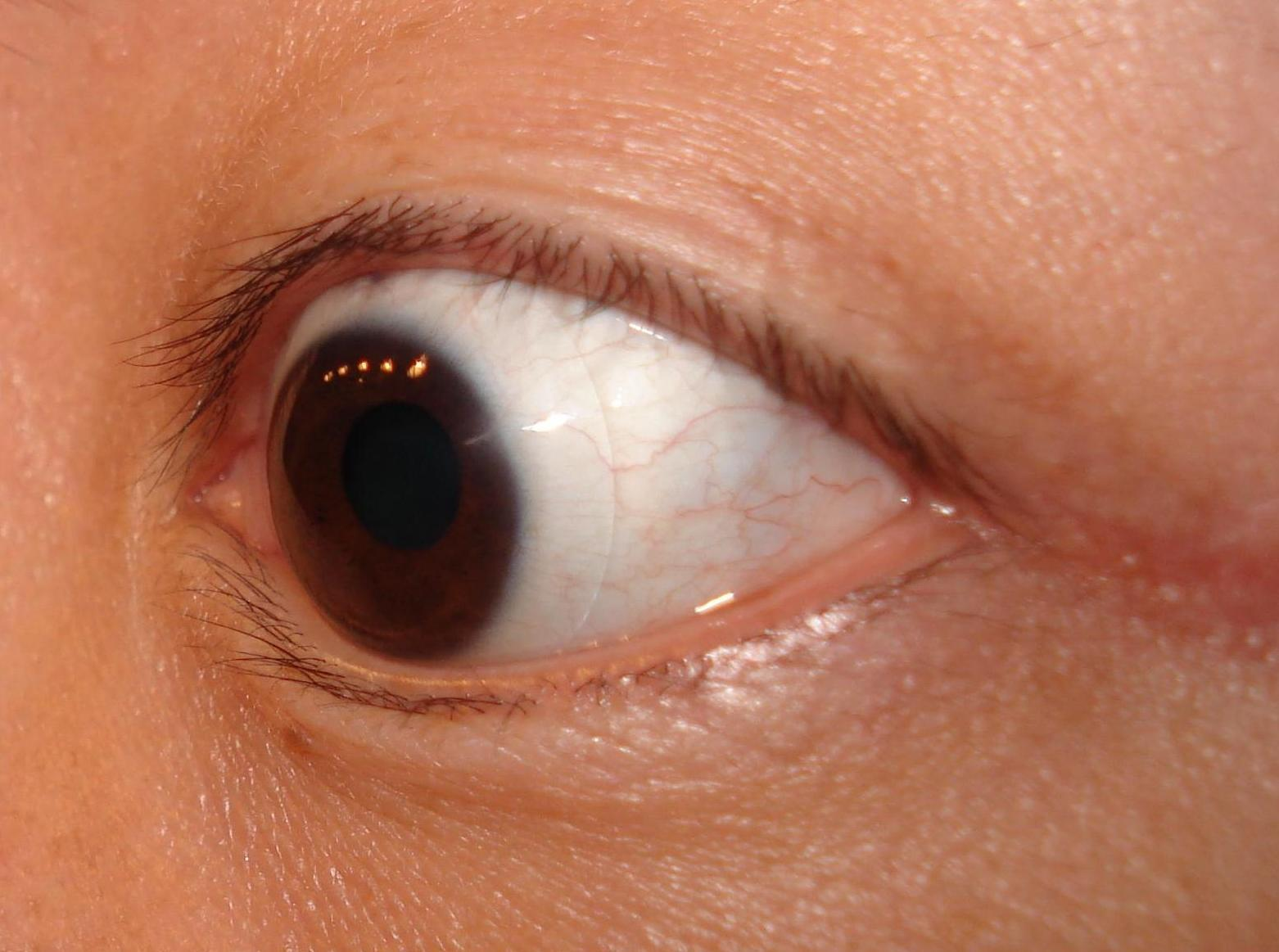 Kontaktlinse im Auge